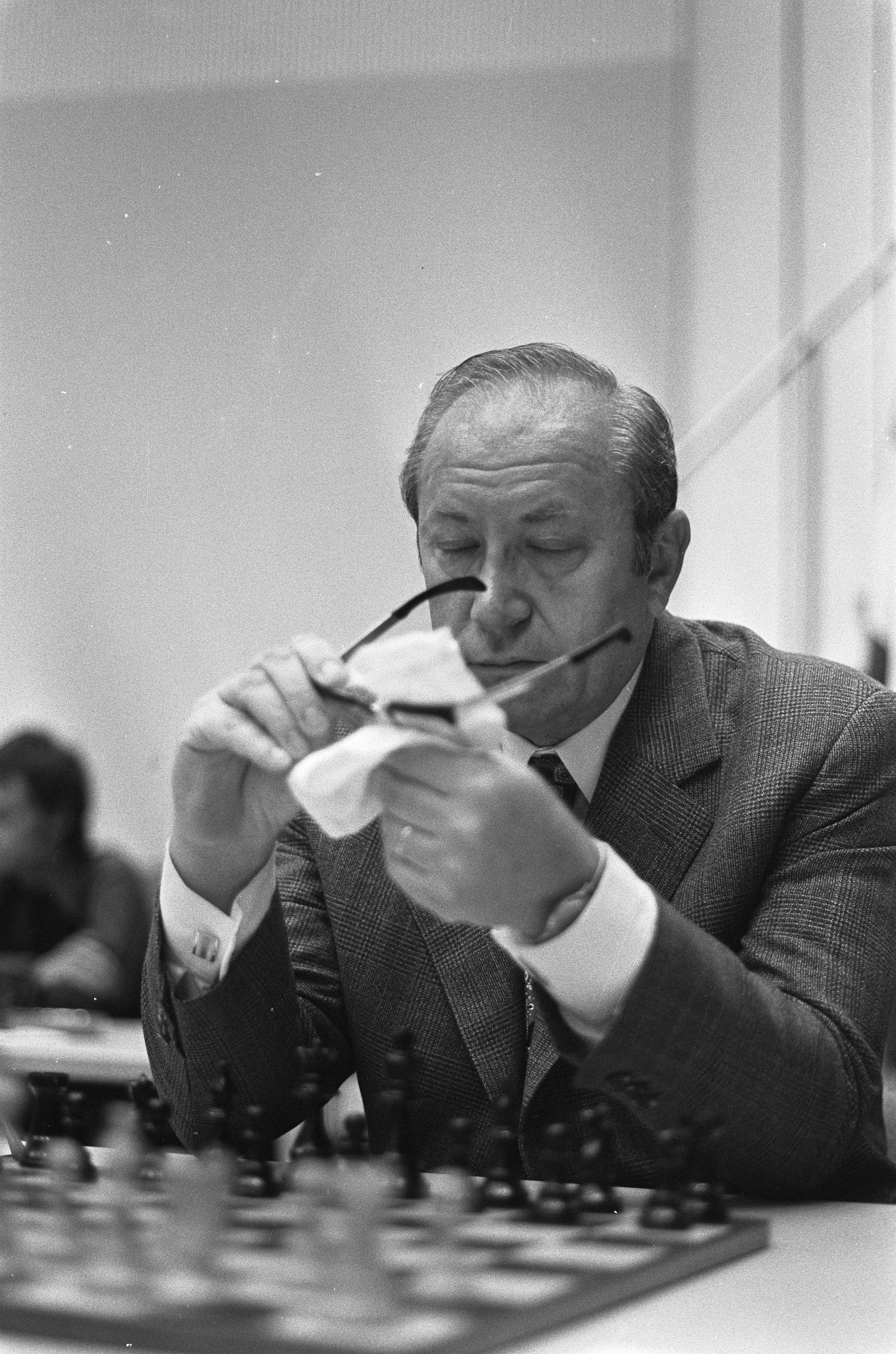 Collectie / Archief : Fotocollectie Anefo Reportage / Serie : [ onbekend ] Beschrijving : AVRO-schaaktoernooi, Szabo Datum : 21 juni 1973 Trefwoorden : schaken Fotograaf : Peters, Hans / Anefo Auteursrechthebbende : Nationaal Archief Materiaalsoort : Negatief (zwart/wit) Nummer archiefinventaris : bekijk toegang 2.24.01.05 Bestanddeelnummer : 926-4973